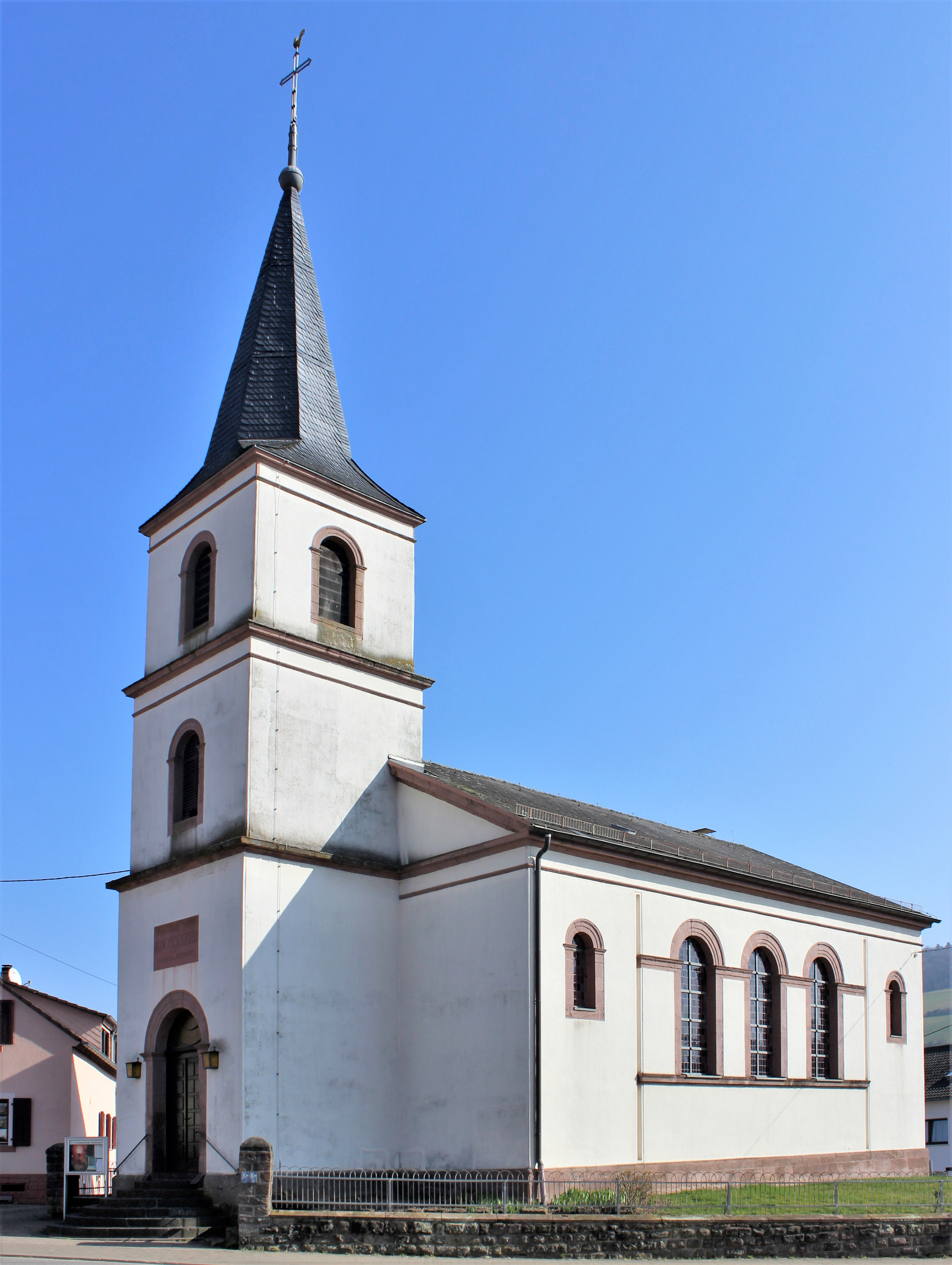 Die evangelische Kirche in Werschweiler, einem Stadtteil von St. Wendel, Saarland